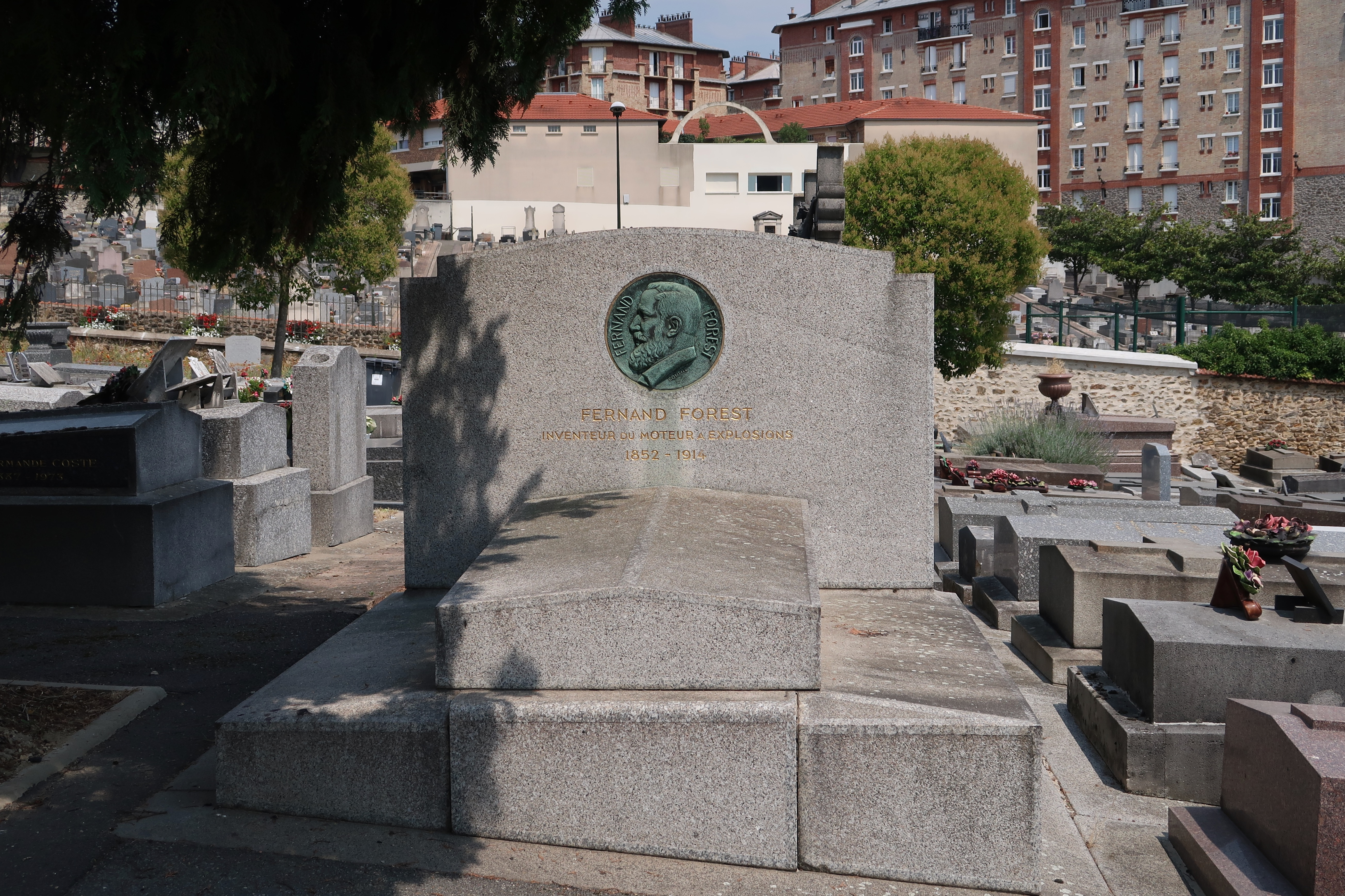 Tombe de l'inventeur Fernand Forest (division 2, allée centrale, près du rond-point central), dans le cimetière Voltaire de Suresnes (Hauts-de-Seine).